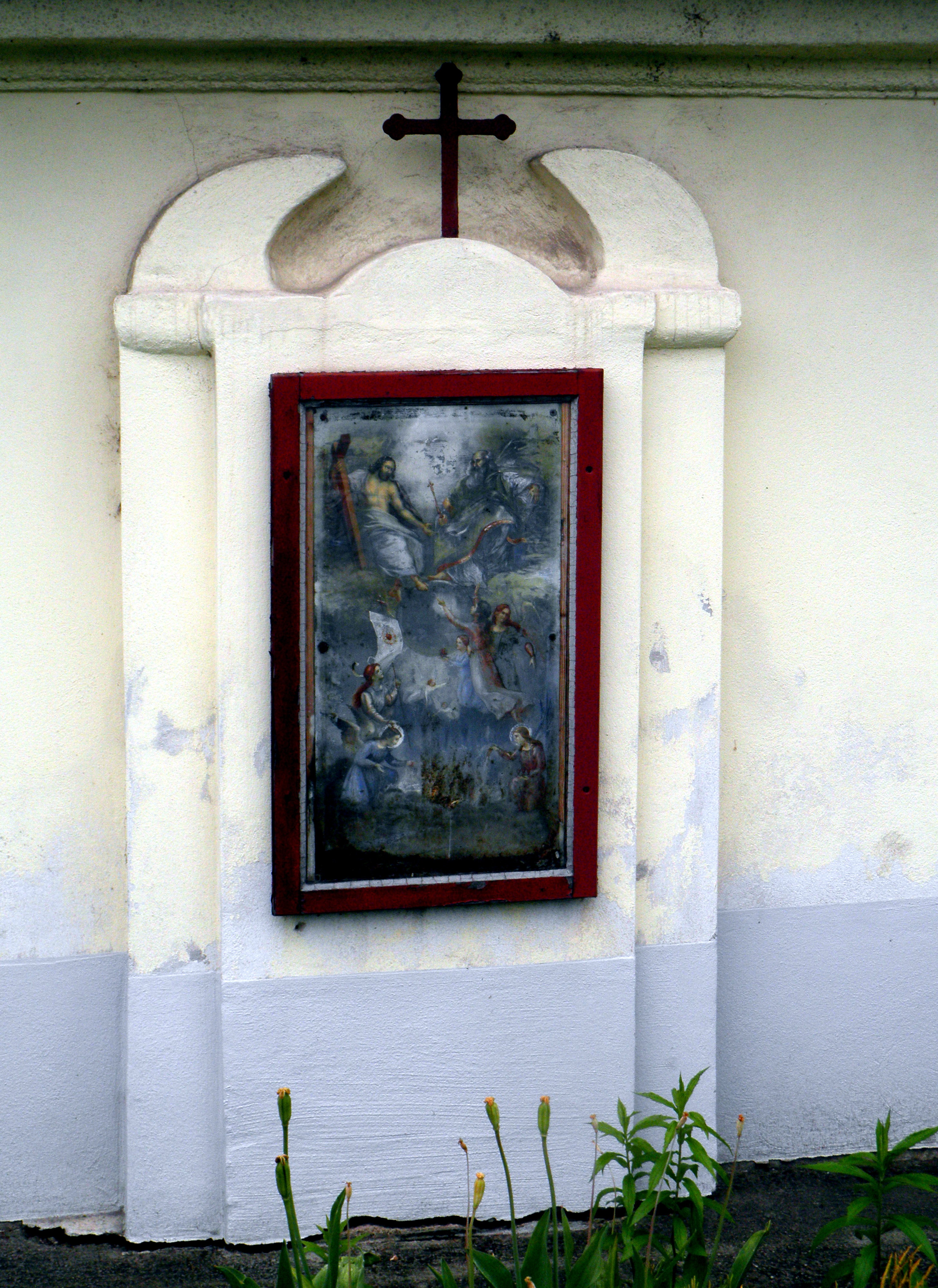 Franzosenkreuz